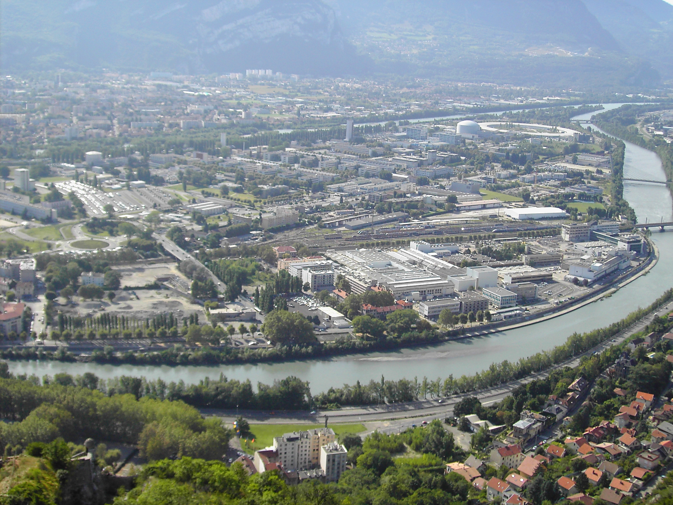 polygone scientifique de Grenoble avec au fond l'ESRF (European Synchrotron Radiation Facilities)